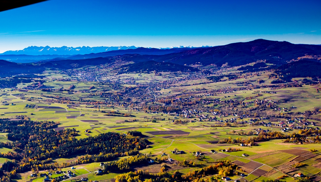 Panorama Słopnic z lotu ptaka